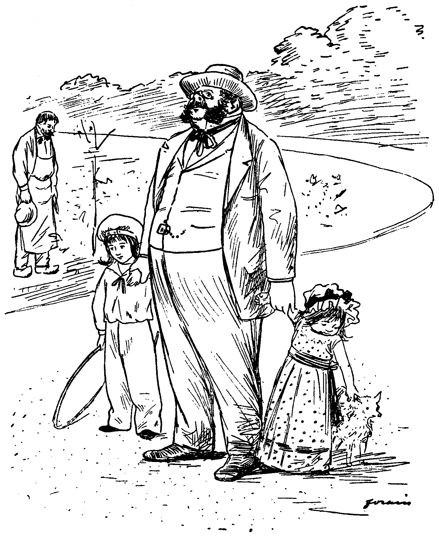 les parvenus, par j. forain